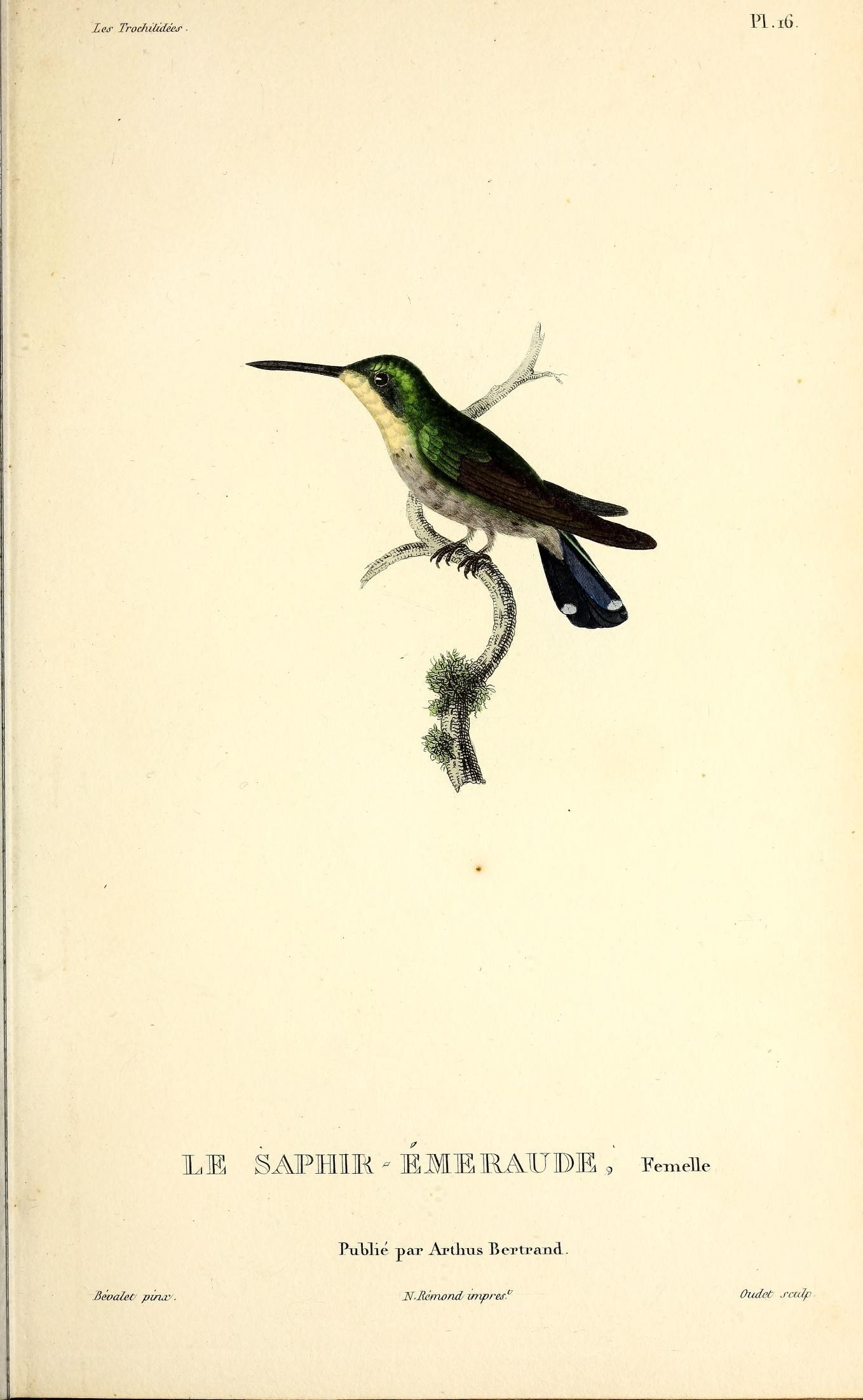 Les trochilidées :. Paris :A. Bertrand,[1832?].